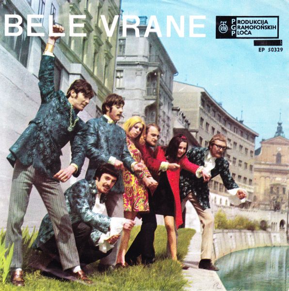 Plošča Presenečenja skupine Bele Vrane.